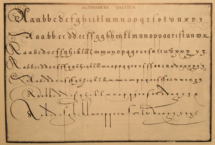 Une planche d'alphabets gravée par Jean Theodore de Bry